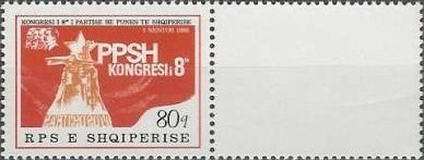 Албанская почтовая марка в честь 8 съезда Албанской партии труда (PPSh)